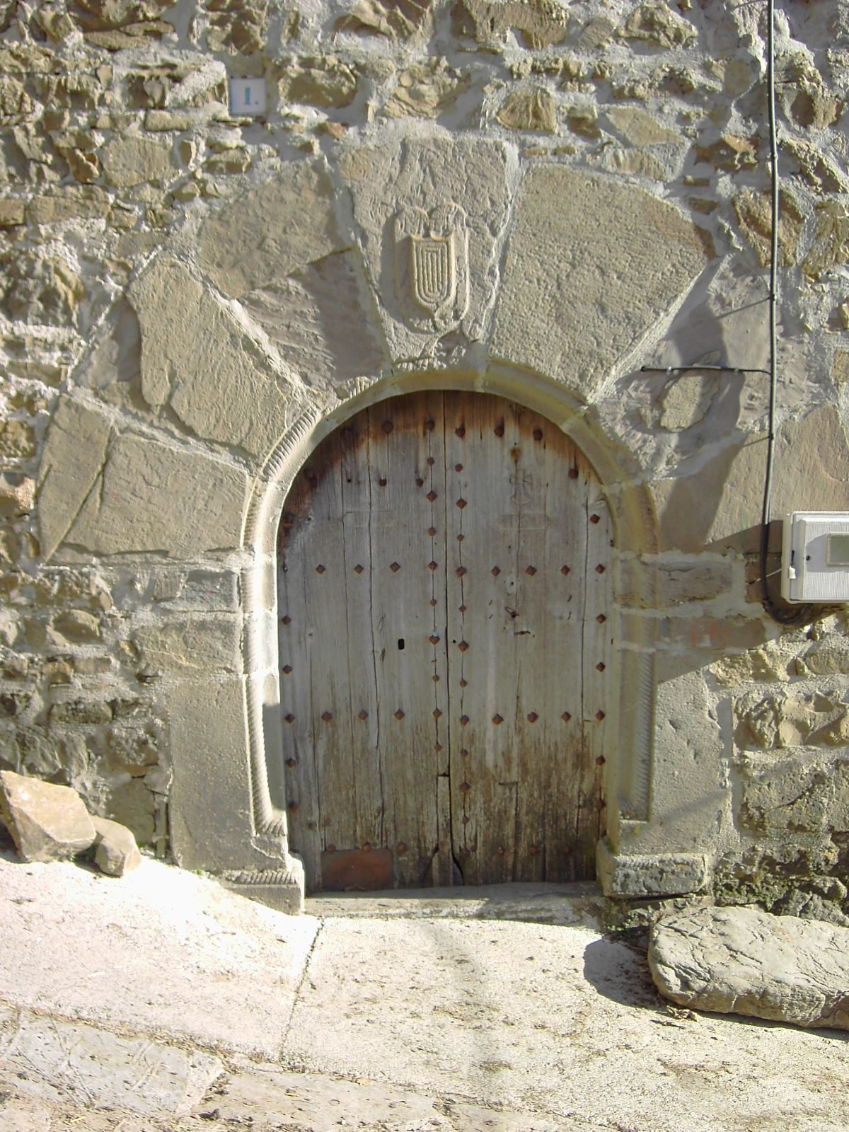 Portalada en el núcleo de an:Puertolas.